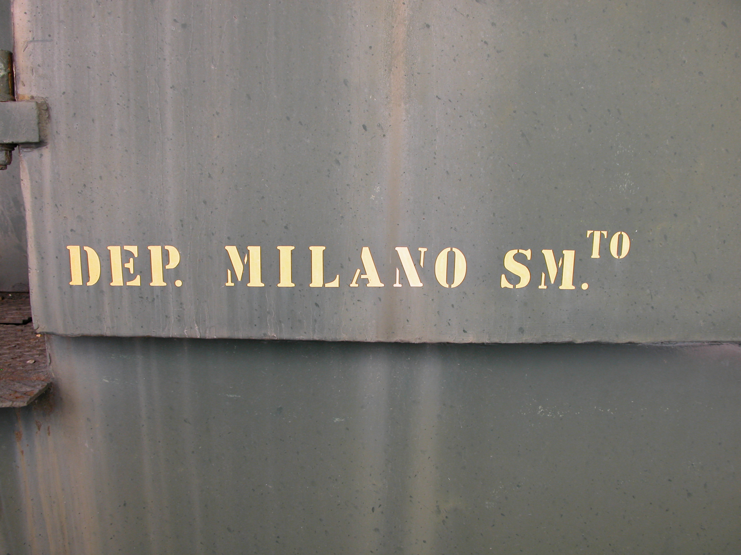 Locomotiva elettrica da manovra FS E.321.003 – Scritta sul lato sinistro della cabina di guida con l'indicazione dell'assegnazione al Deposito Locomotive di Milano Smistamento.